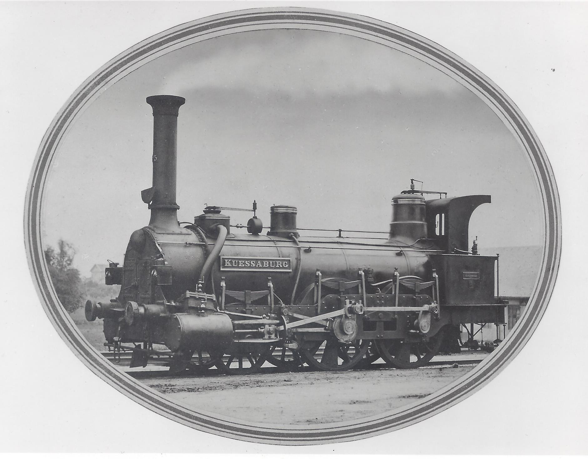 Dampflokomotive Küssaburg Typ Badische IX (alt), 1856